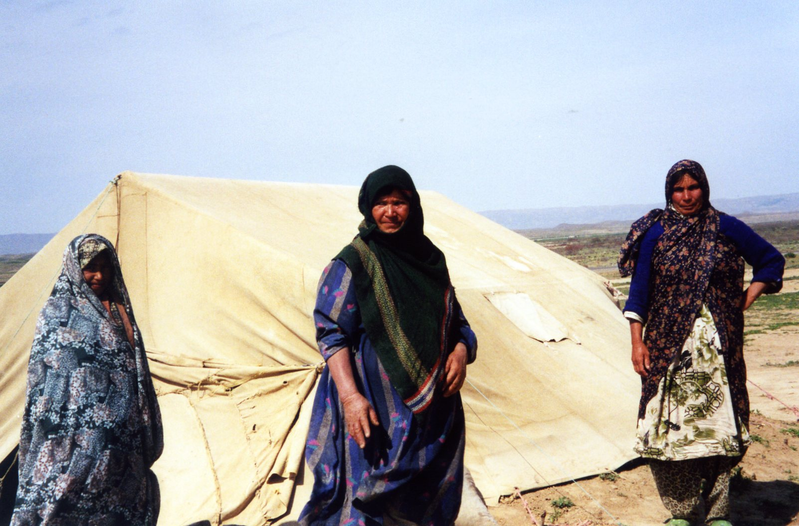 Nomades / migrantes Iran - Campement nomade à la frontière afghanistan